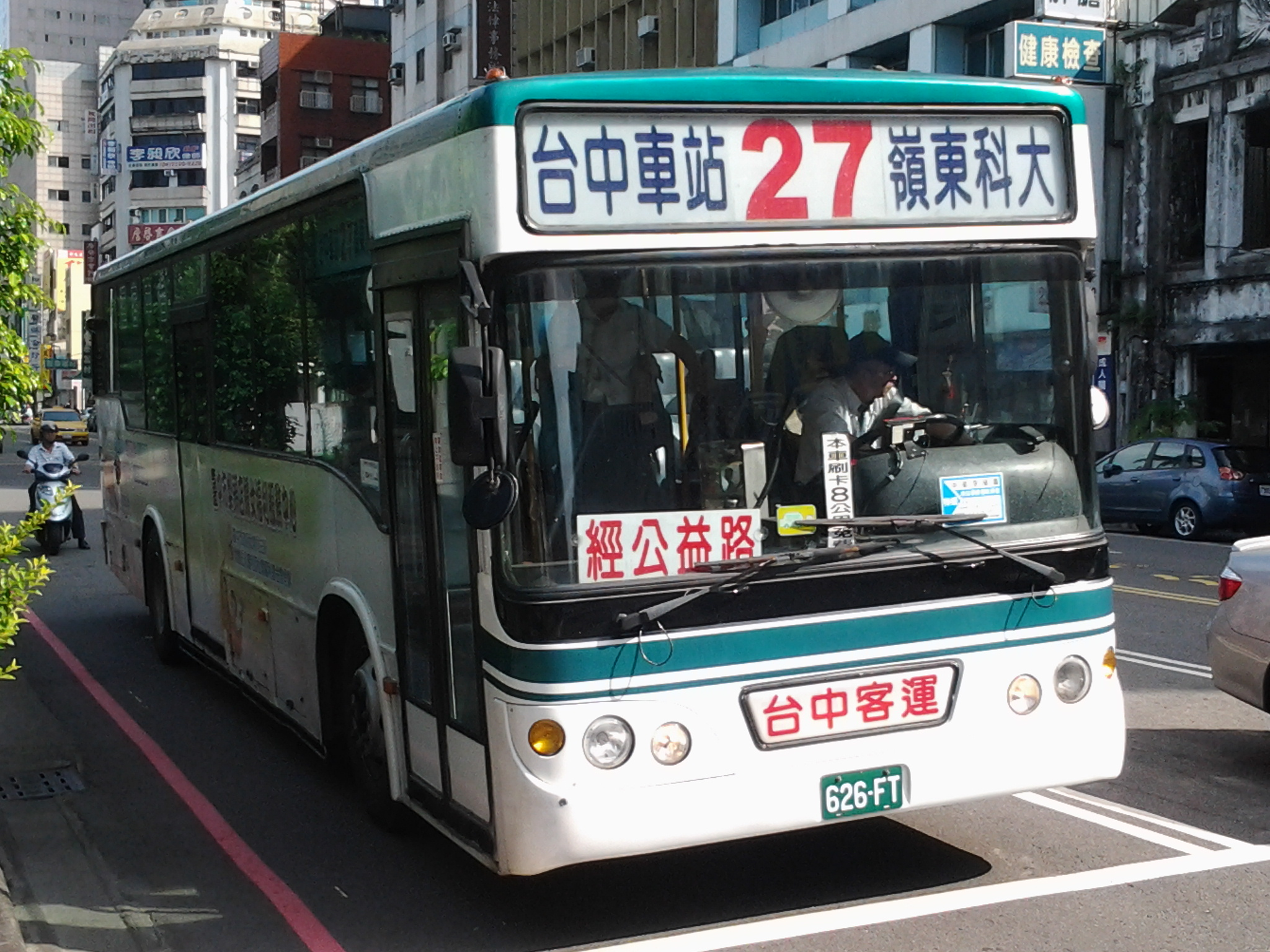 2002〈2011〉 HINO ERK2JRL（固特）